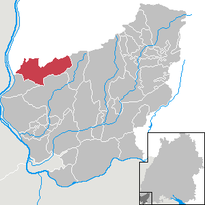 Schliengen, Landkreis Lörrach, Baden-Württemberg